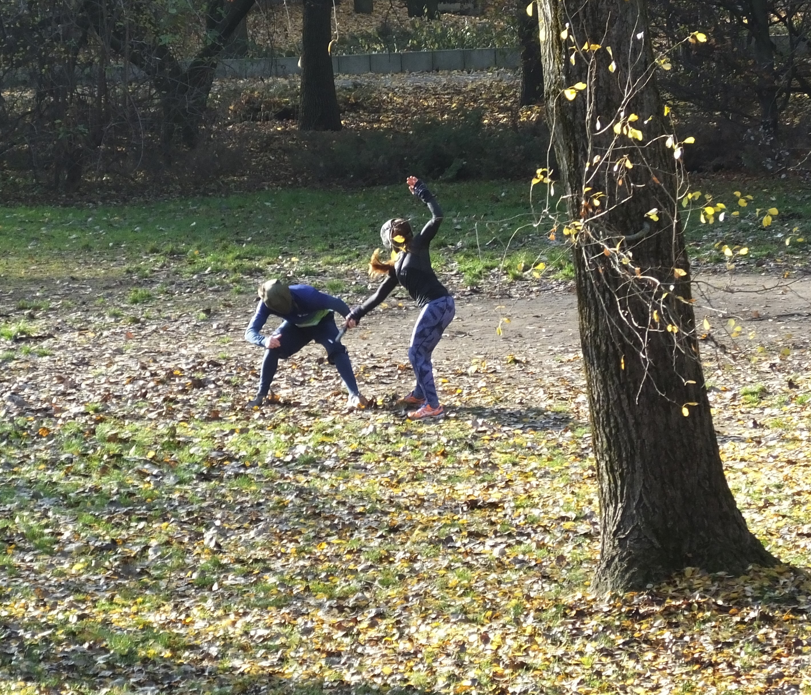 Trening fechtunku na Polu Mokotowskim w Warszawie